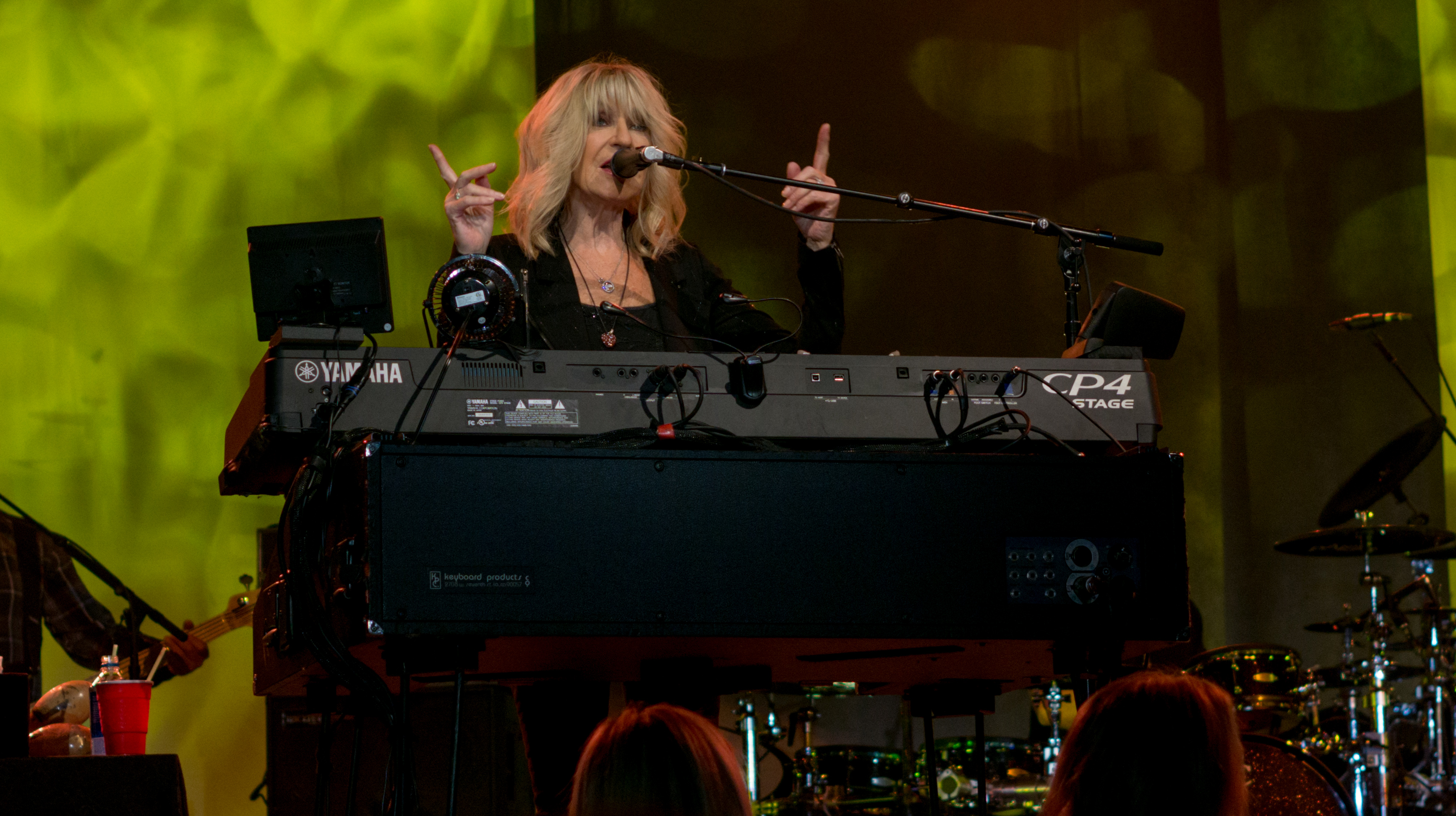 Christine McVie